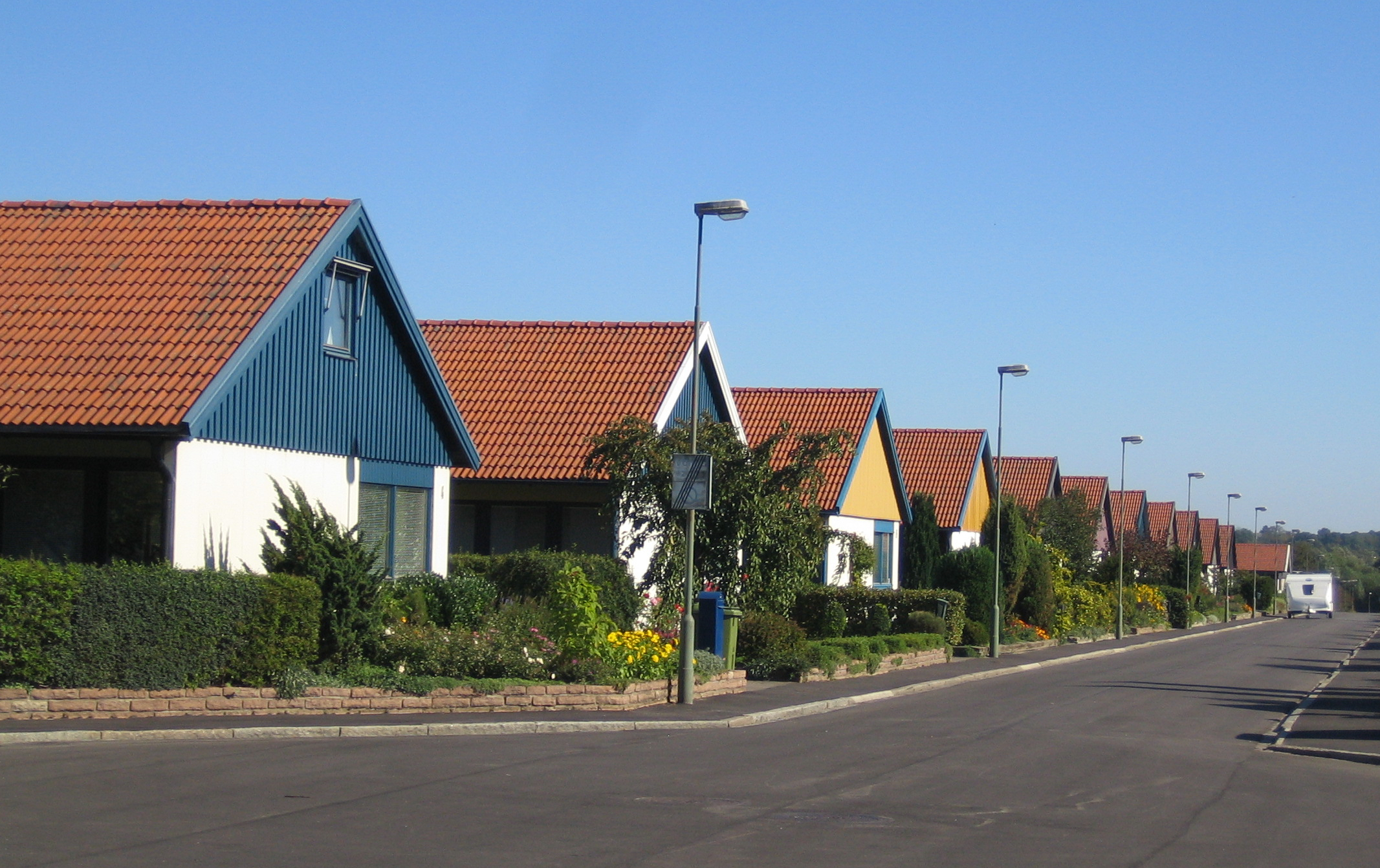 Jägersro villastad, Malmö, Sweden